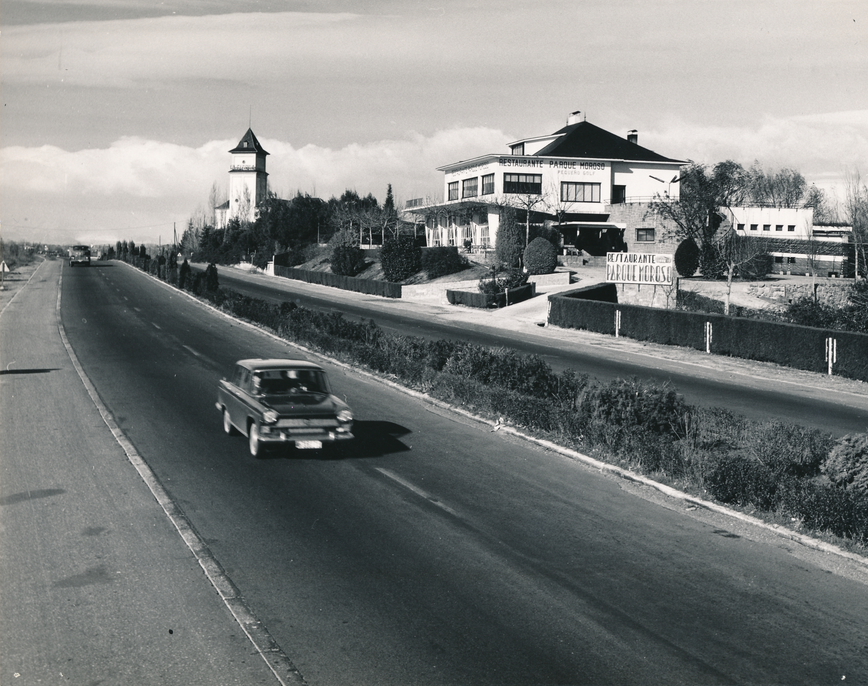 Madrid, 1962 Procedencia: Archivo Fotográfico de la Dirección General de Turismo (1940-1992) Fotógrafo: Servicio Oficial del Ministerio de Información y Turismo Registro nº: 01194 Signatura: Caja 12 Fondos: Biblioteca de la Facultad de Empresa y Gestión Pública (Universidad de Zaragoza) Legado: Luis Fernández Fuster / E.S. Turismo Huesca